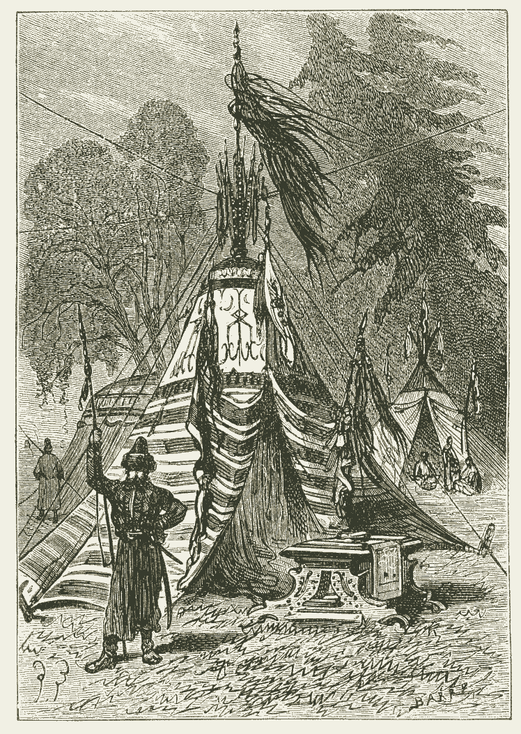 Jules Verne, gravure uit boek "Michael Strogoff", boek is van 1918 of iets ouder. Deze afdruk is uit de Nederlandse vertaling, de zogenaamde "oude blauwe bandjes". Het is uit 1918 of ouder, en kostte 1,50 gulden. Uitgevers-maatschappij "Elsevier", Amsterdam. Stoomdrukkerij P.J. Out Zaandijk.